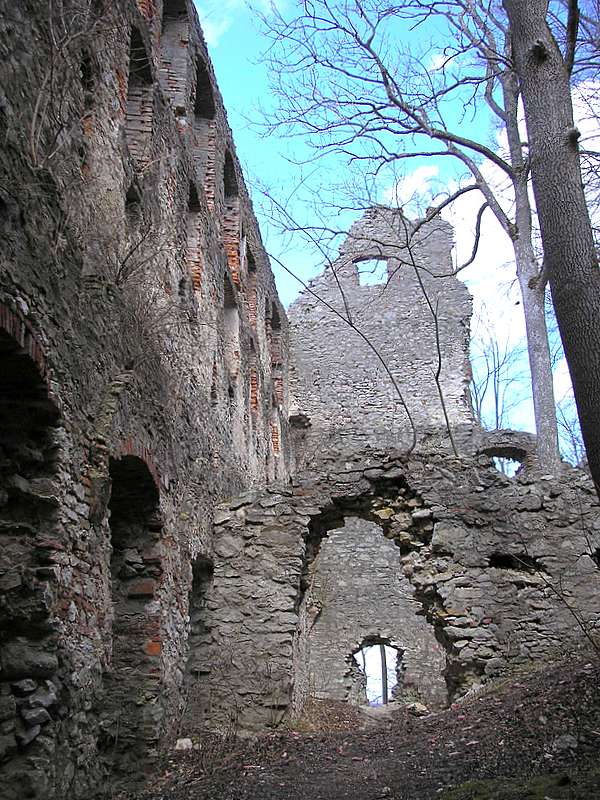 Der einsturzgefährdete Palas